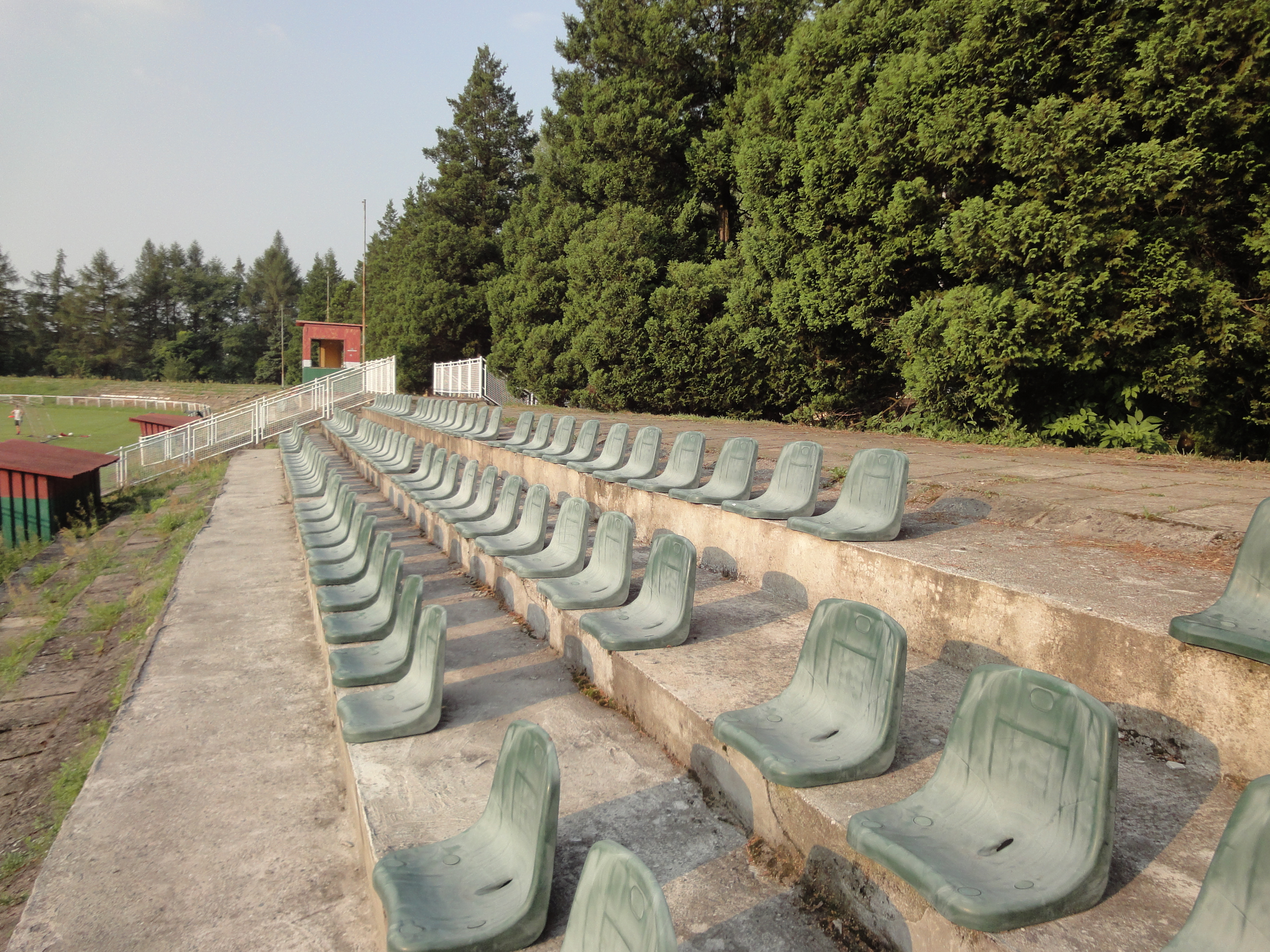 Trybuny stadionu w Wojkowicach